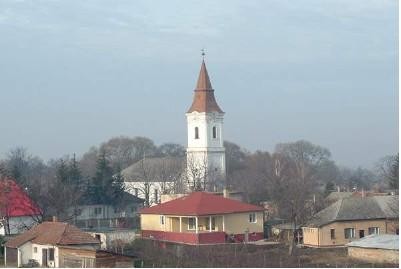 A balkányi református templom.